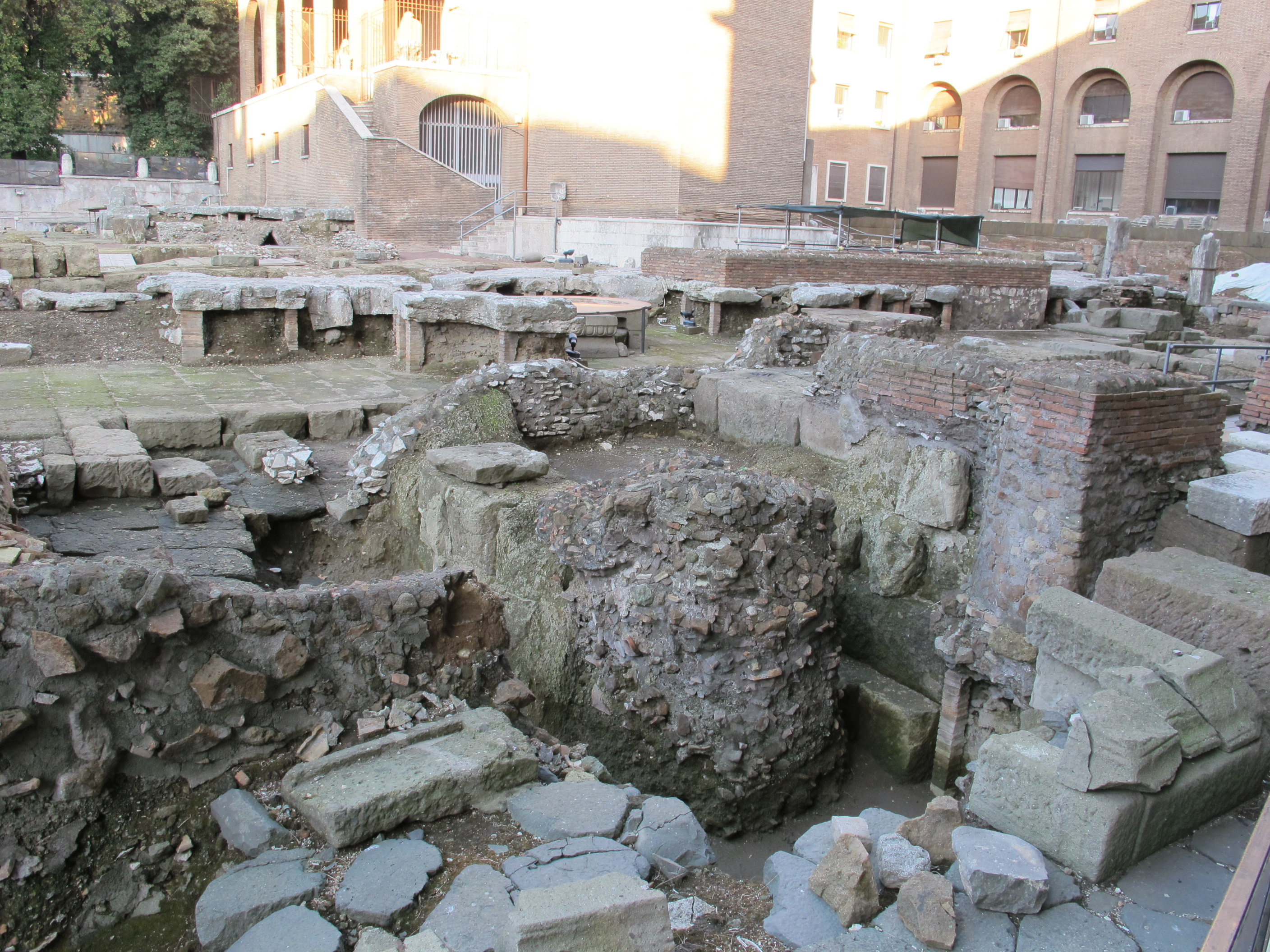 Area di sant'omobono